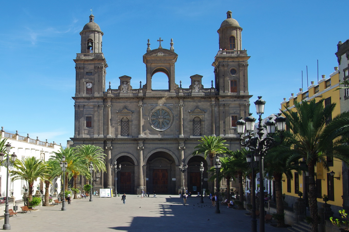 Kathedrale Santa Ana Las Palmas Gran Canaria